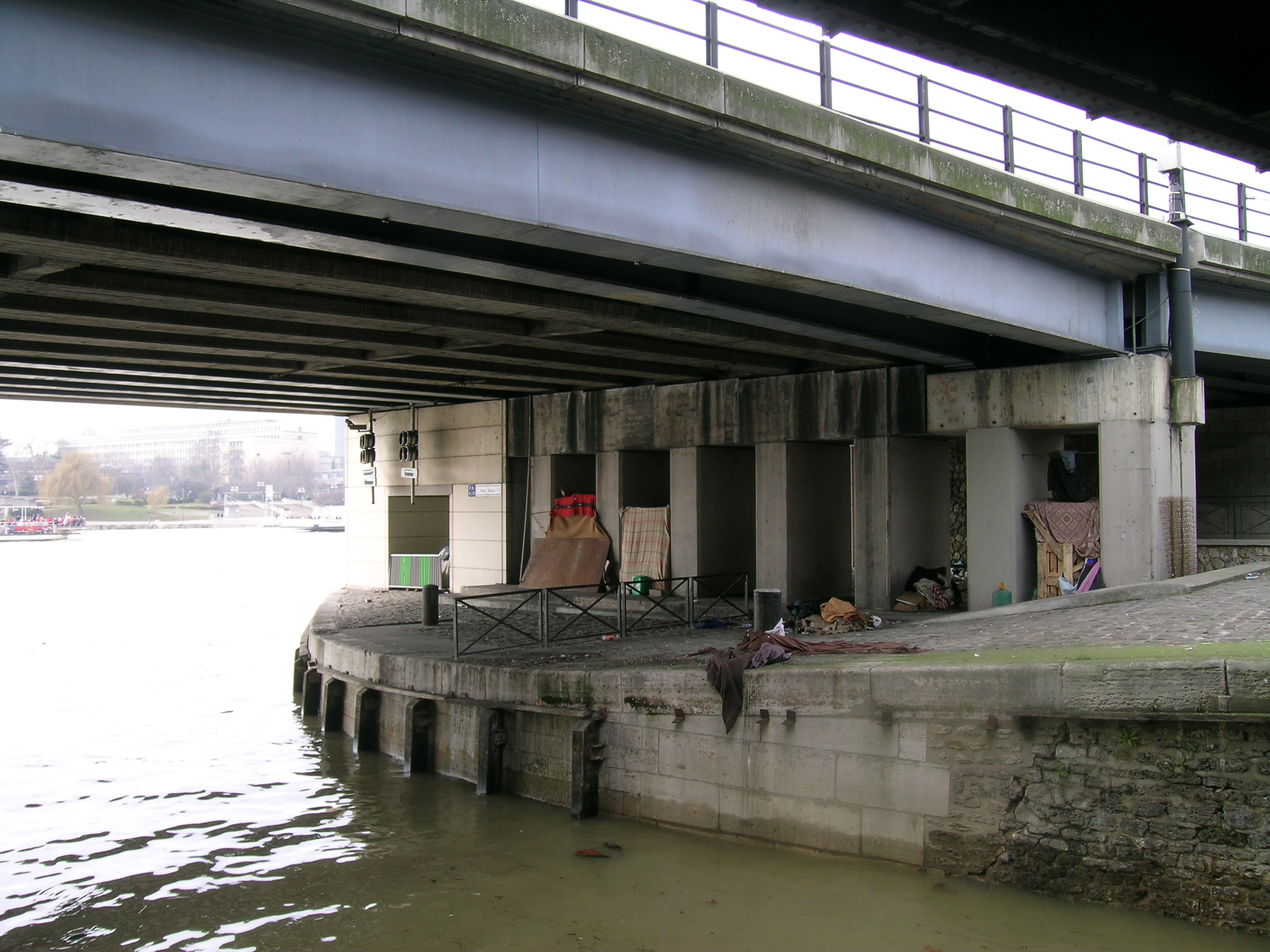 Habitat de "fortune" sous un pont parisien. Pont Morland. On aperçoit au fond les Jardins Tino Rossi avec l'ancien batiment de la Faculté des Sciences (Jussieu) du Quai Saint-Bernard.